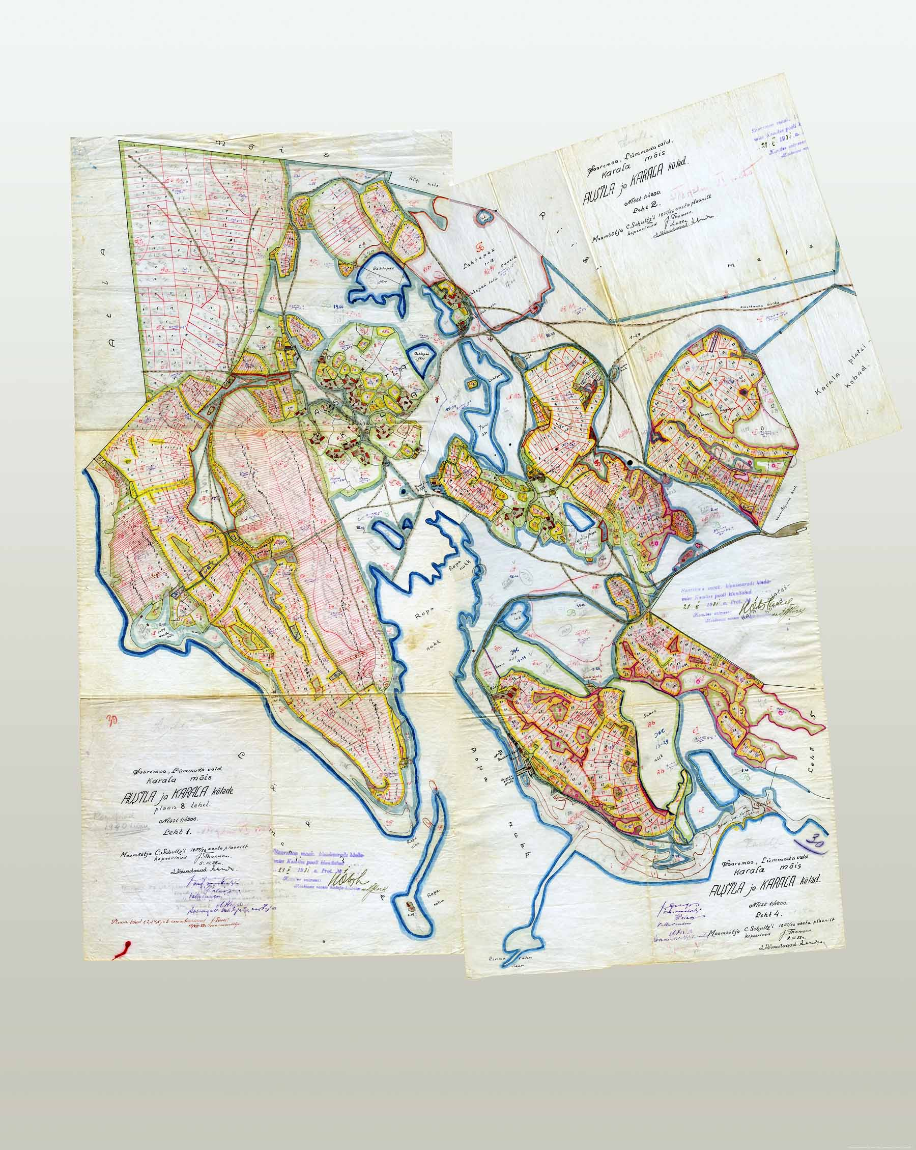 Kaardi originaal asub Maa-ameti Saaremaa katastriosakonna arhiivis. Skaneerinud 12.04.2011 V. Laanemaa.